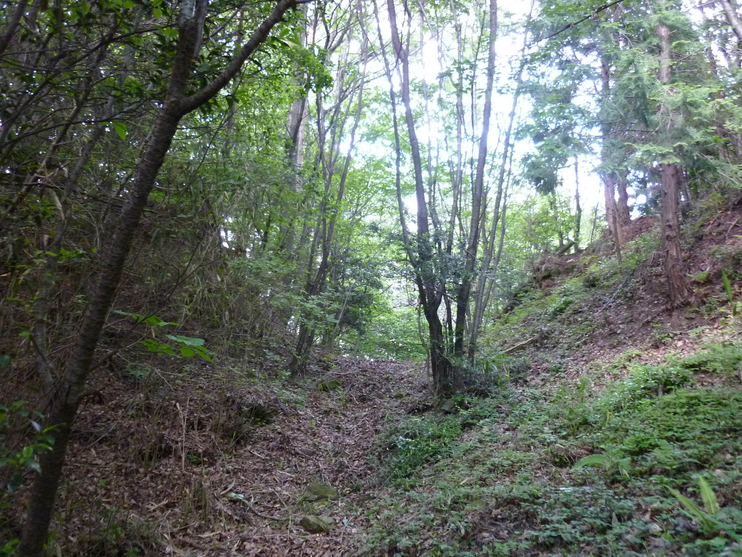 堀切跡